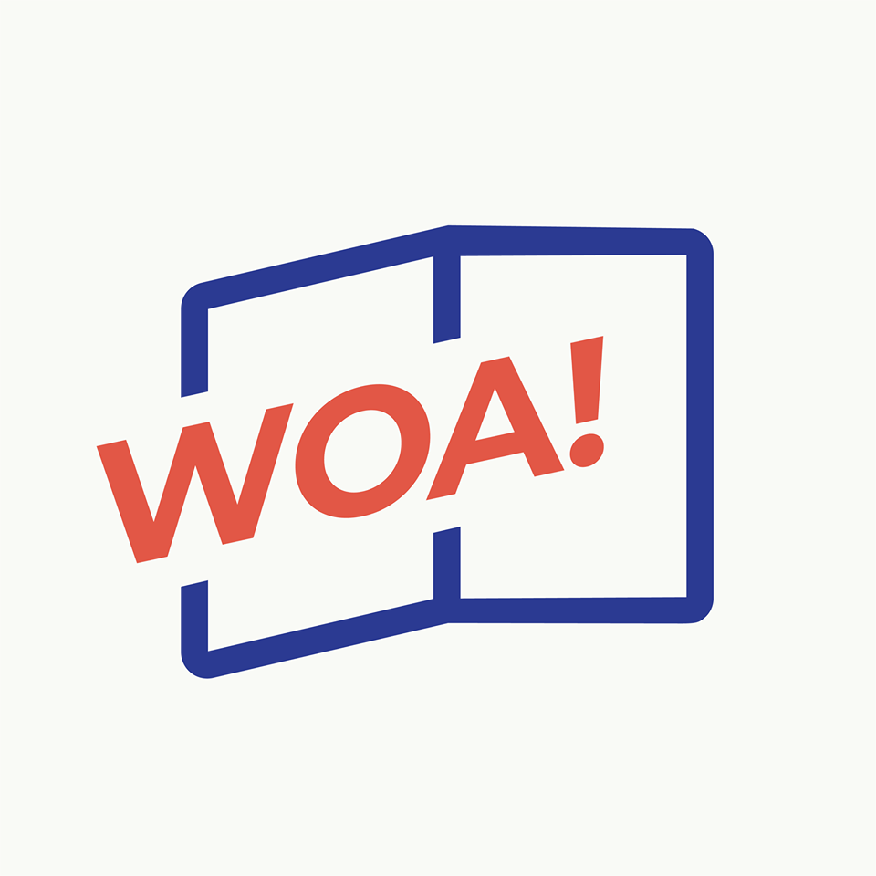 Офіційний логотив центру "Вікно в Америку"